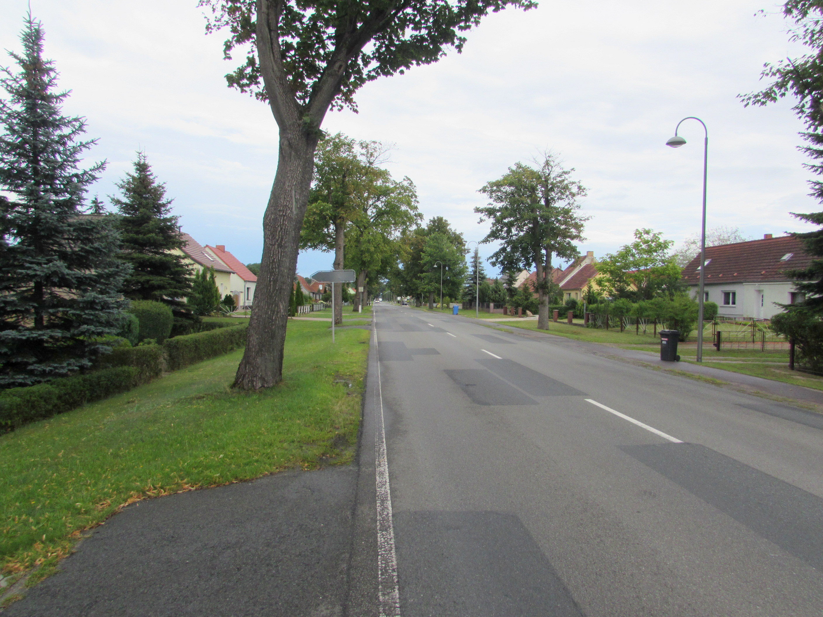 neubensdorf